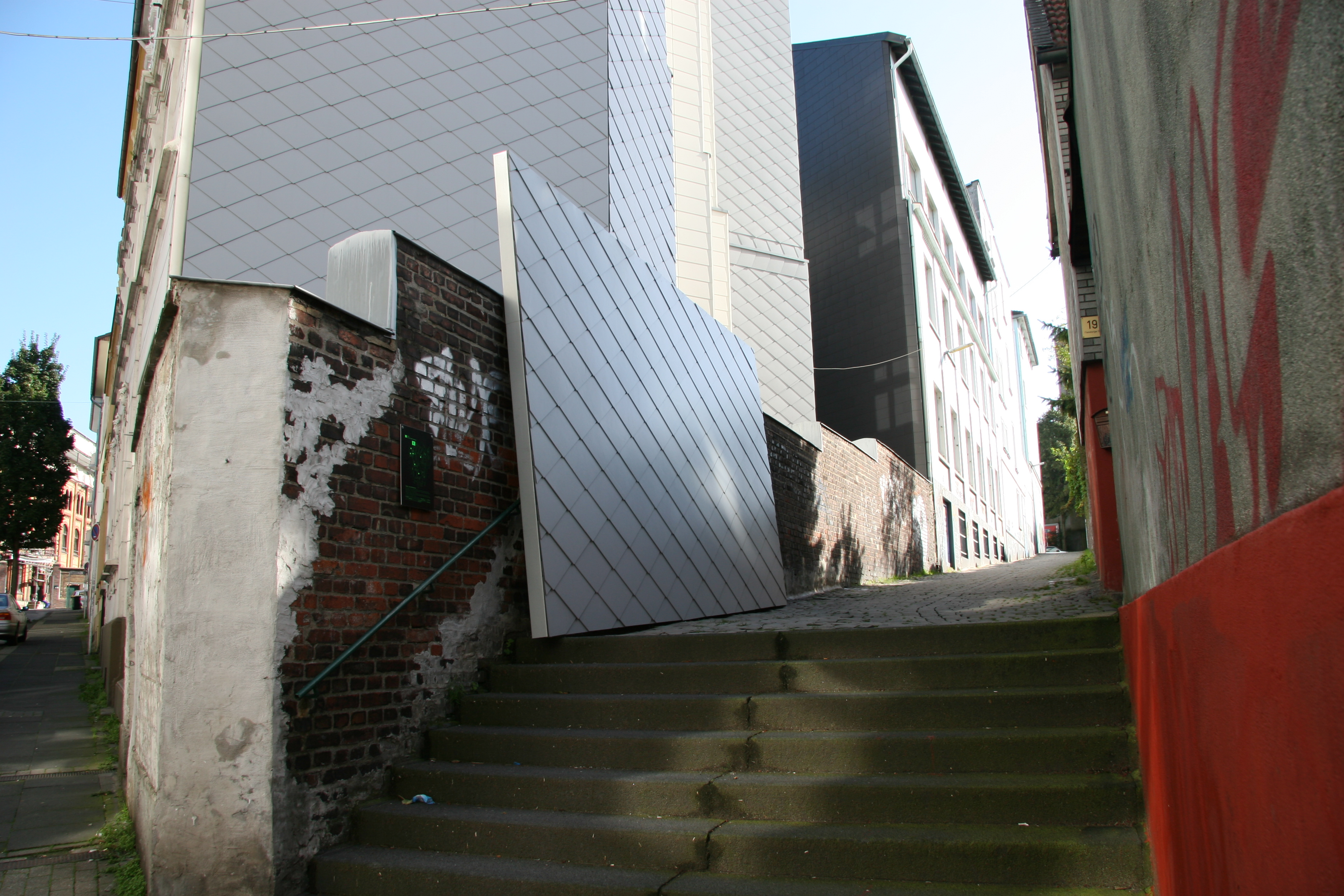 Relief von Maik and Dirk Löbbert, Treppe Kosakenweg in Wuppertal-Ostersbaum während der Bergischen Expo 2006 als Teil des Kunstprojekts 7 Treppen - 7 Künstler - 7 Positionen der Elisabeth Montag Stiftung